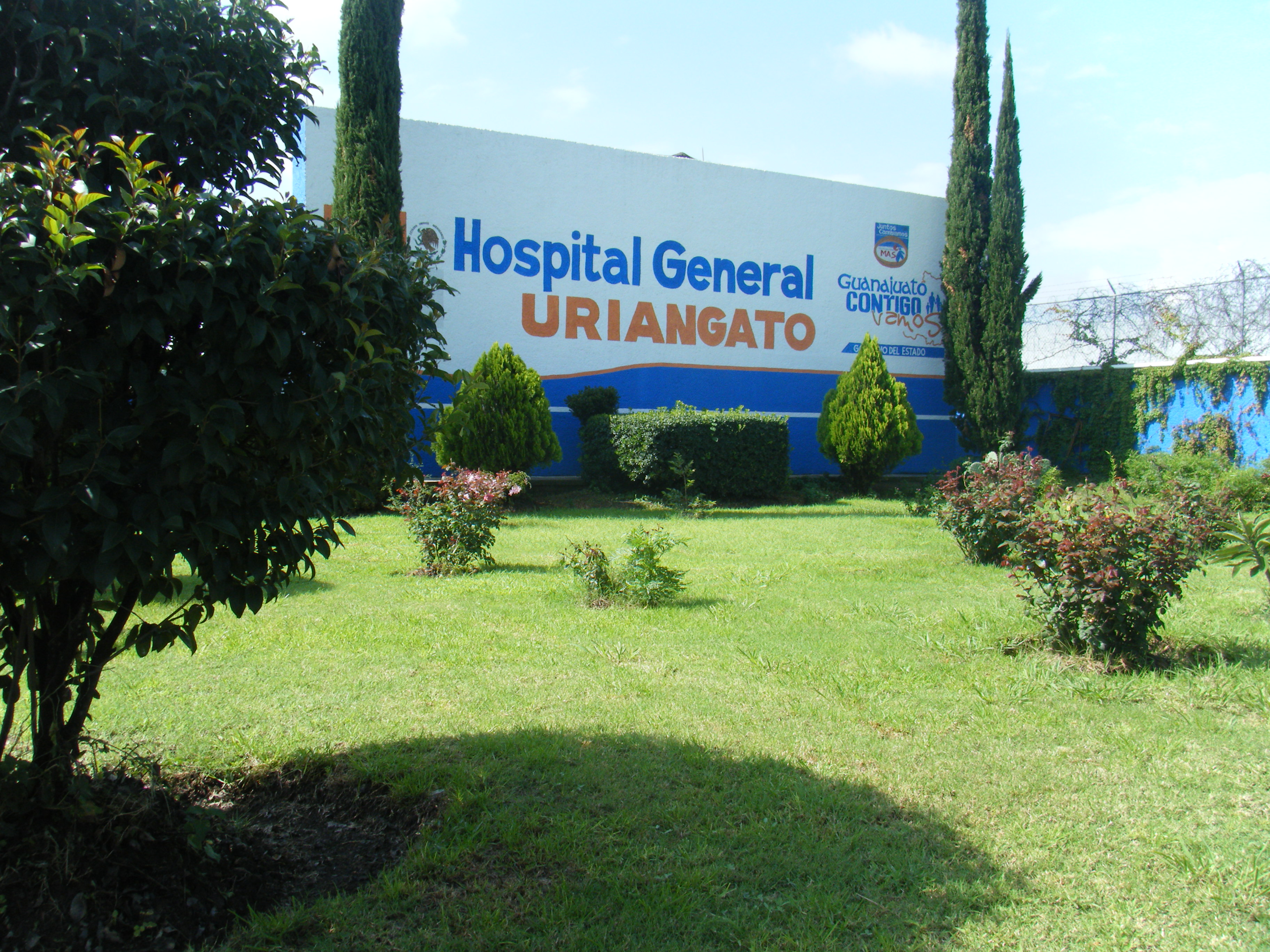 Hospital General